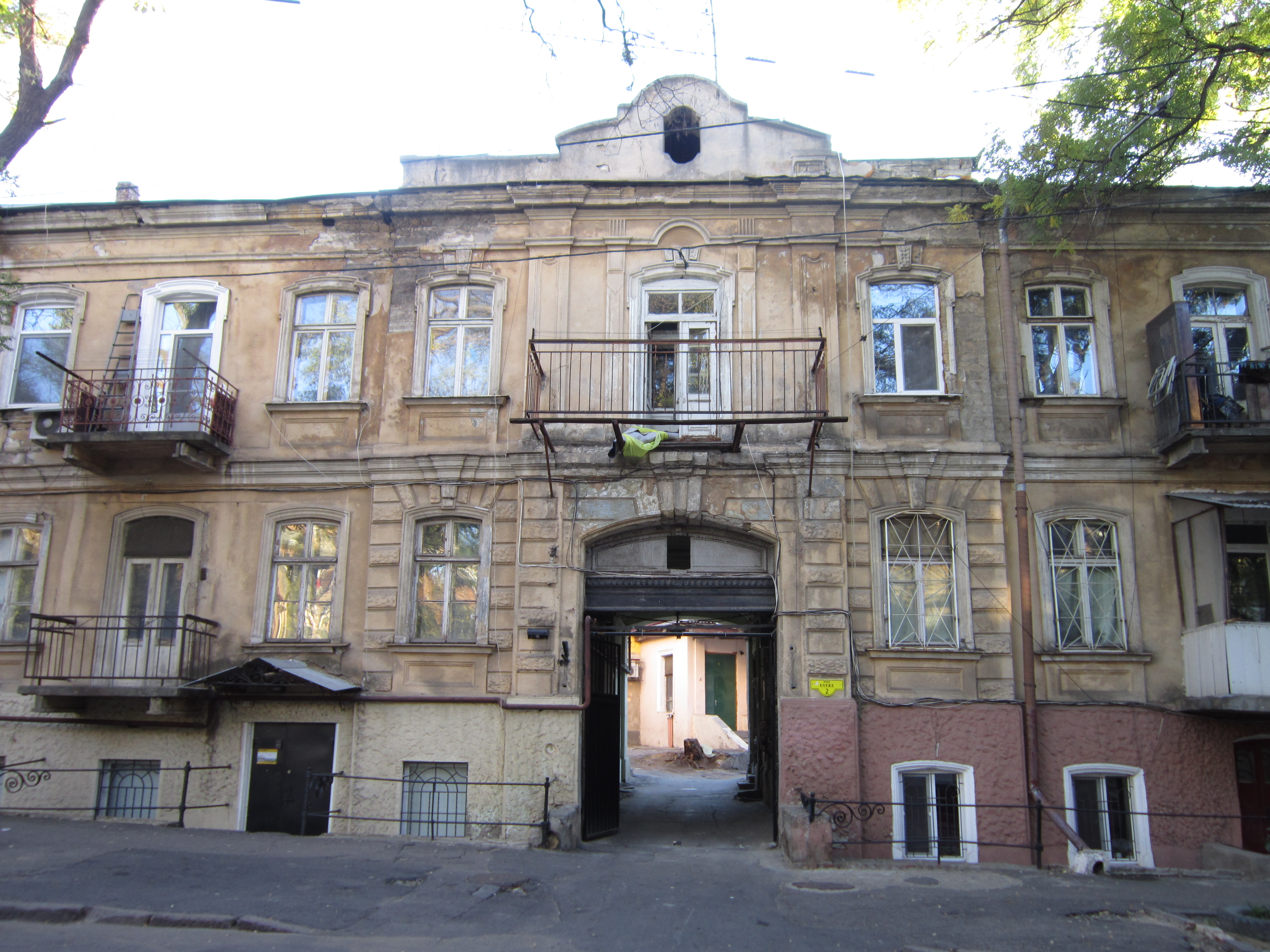 Будинок, в якому жили:- А.М. Кангер - фармаколог, засновник фармакологічної школи, засновник і перший ректор Одеського фармакологічного інституту;- П.М. Сараджишвілі і О.І. Мязін - нейрохірурги і невропатологи, акад.. АМН СРСР і АН ГРСР, лауреати Держпремій СРСР і ГРСР, які в 1958 р., у Тбілісі організували єдиний у світі інститут епілепсії;- М.Г. Чеботарьов - математик, член –кореспондент АН СРСР;- Д.І. Сосновський - ботанік, акад. АН ГРСР, Одеса, Князівська вул., 2